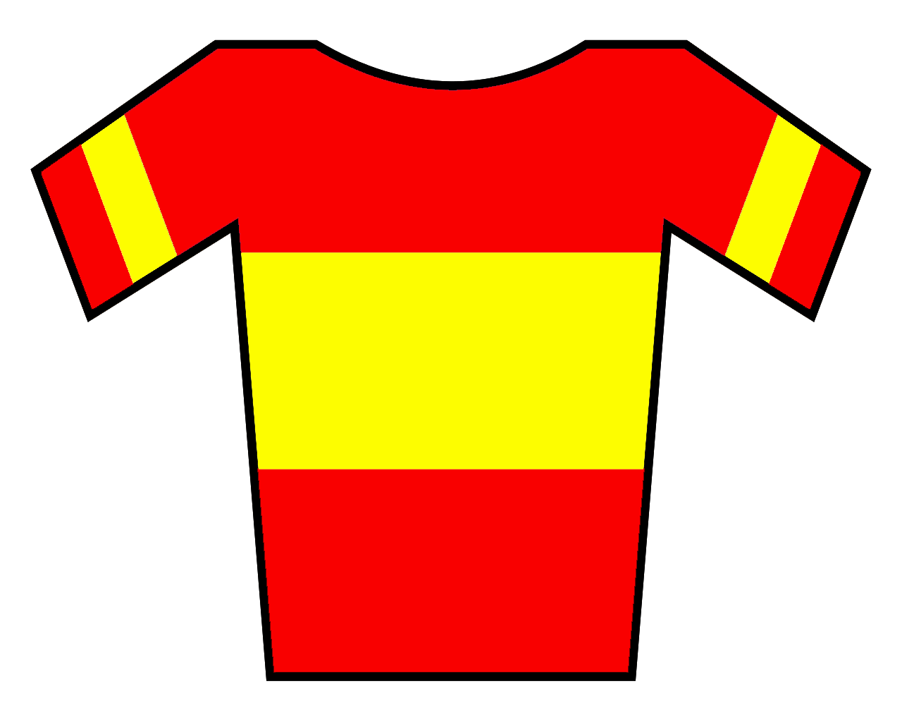 Maillot de España